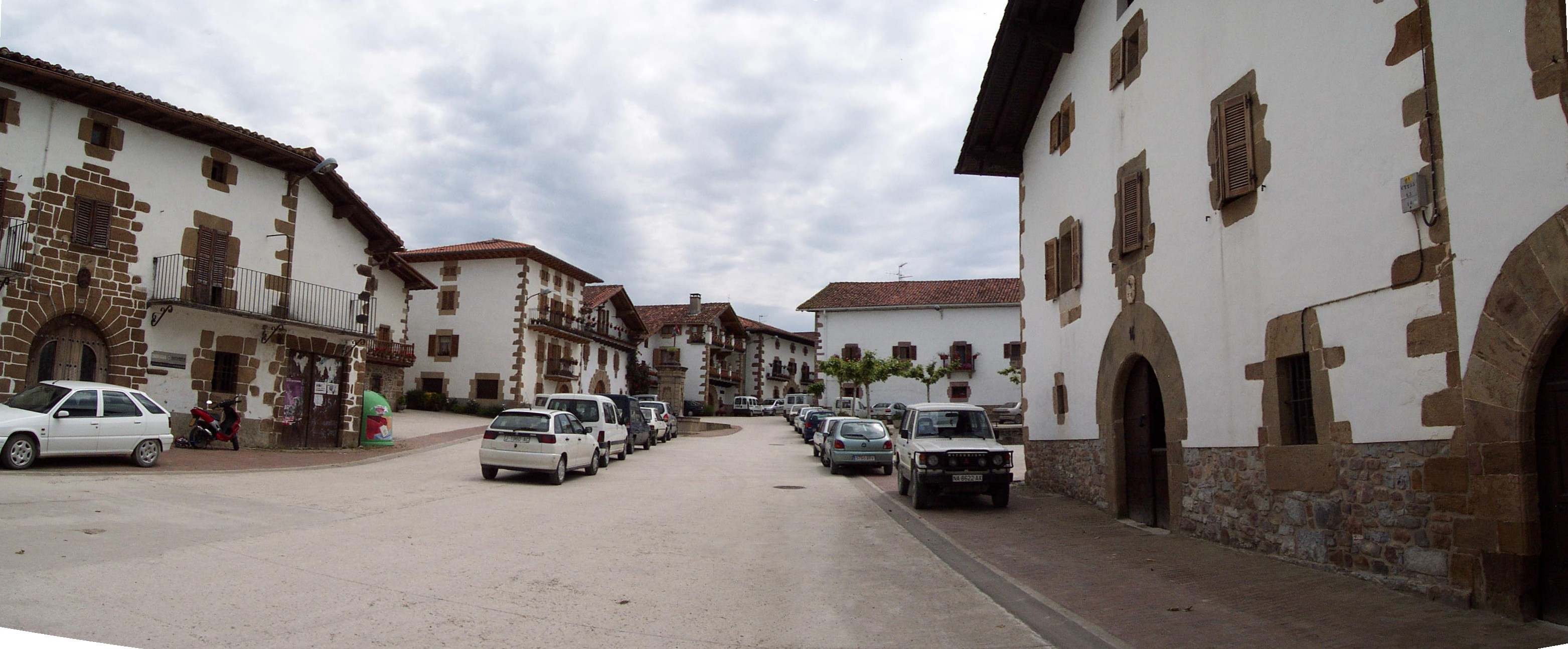 La calle-plaza de Iráizoz